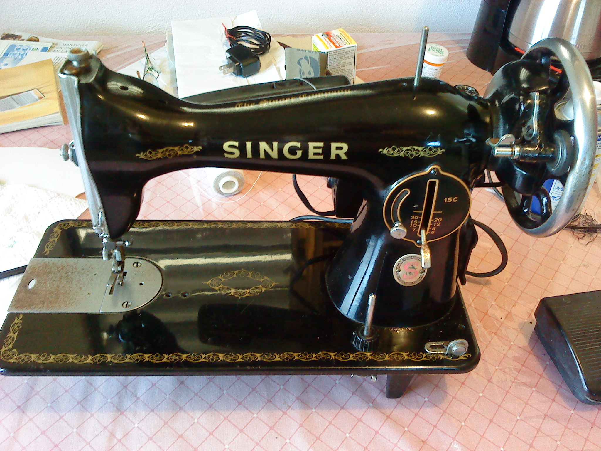 Maquina de coser singer la negrita